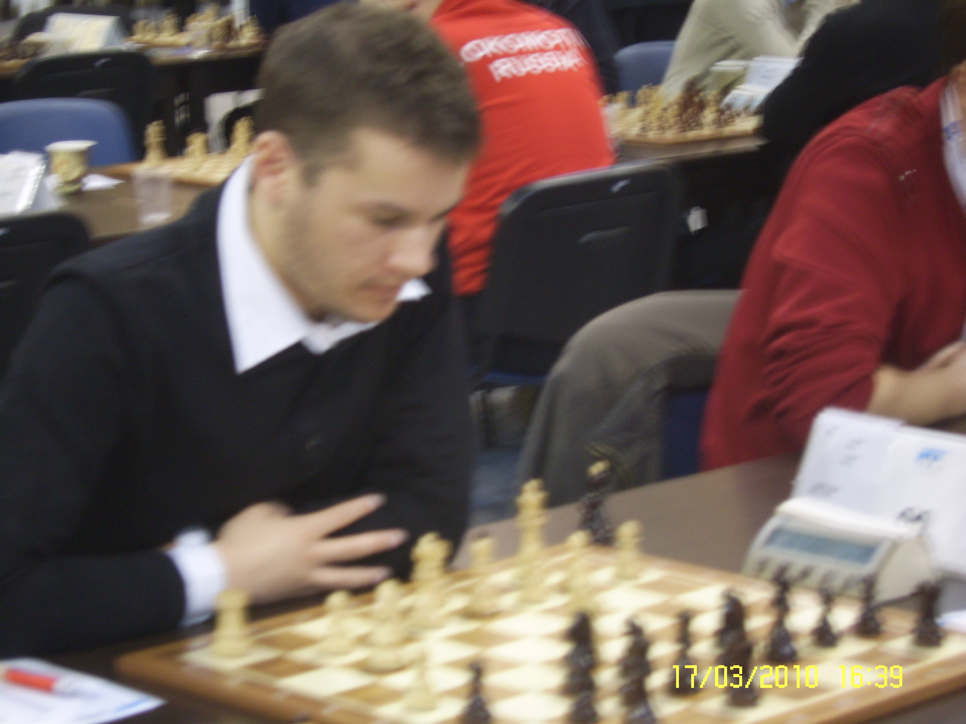 Hrvatski velemajstor Ivan Šarić na 11. Europskom pojedinačnom prvenstvu u šahu za muškarce i žene 2010. g. u Rijeci